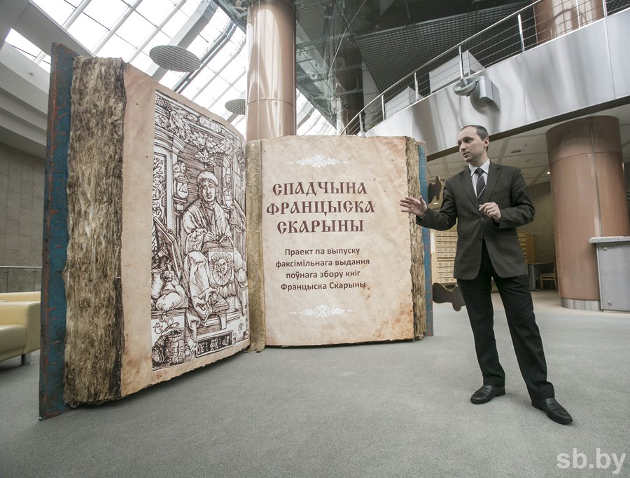 Алесь Суша ля скарынаўскага арт-аб'екта ў Нацыянальнай бібліятэцы Беларусі